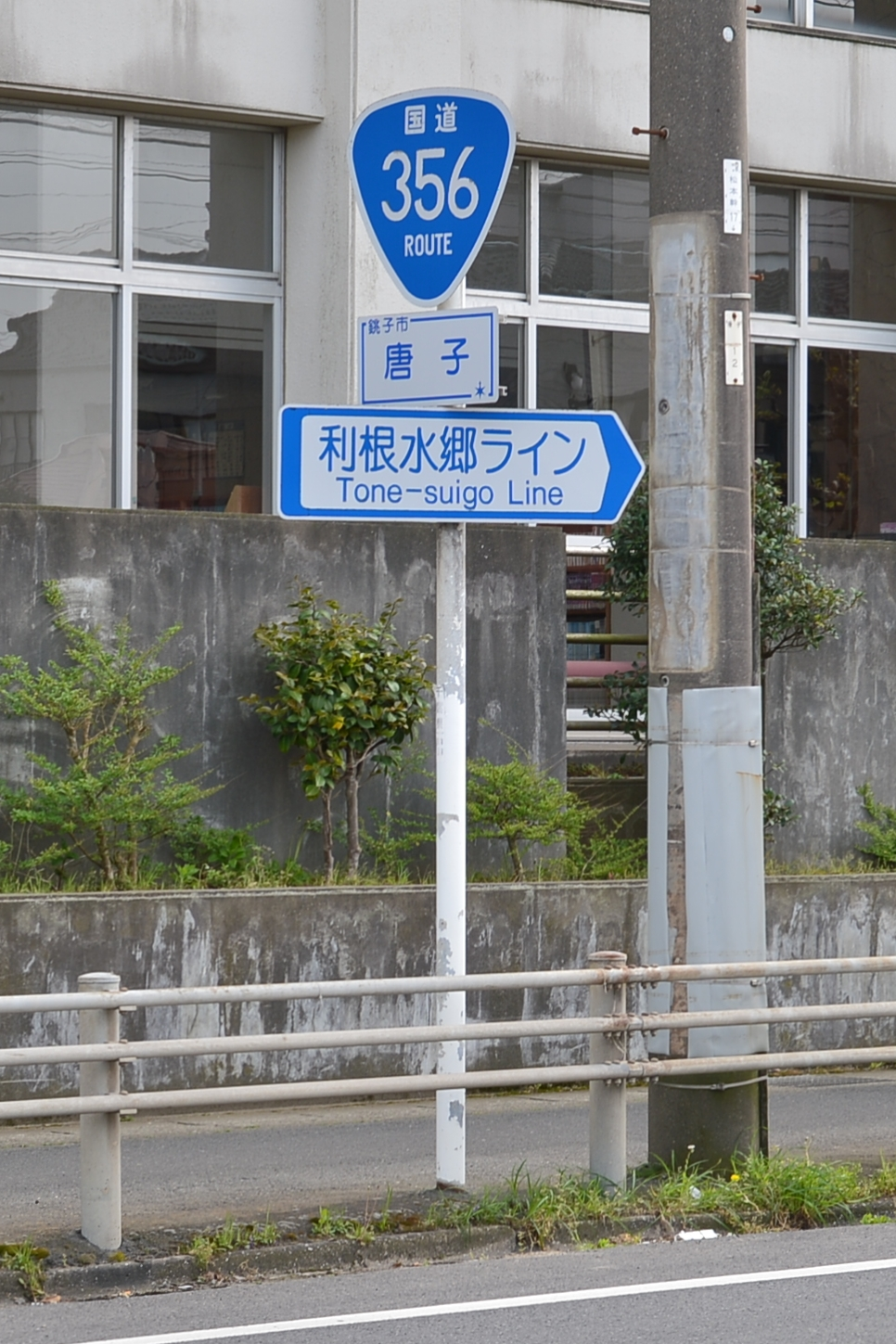 「利根水郷ライン」の道路標識（国道356号） 銚子市唐子町の起点（銚子大橋前交差点）付近。銚子中学校脇の歩道に設置された利根水郷ライン・国道356号の道路標識。